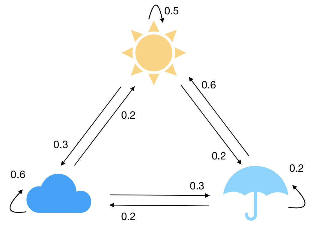 یک زنجیر ساده از حالات آب‌وهوا